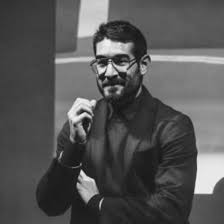 Solimán López à Art Santa Monica, présentant le Harddiskmuseum.